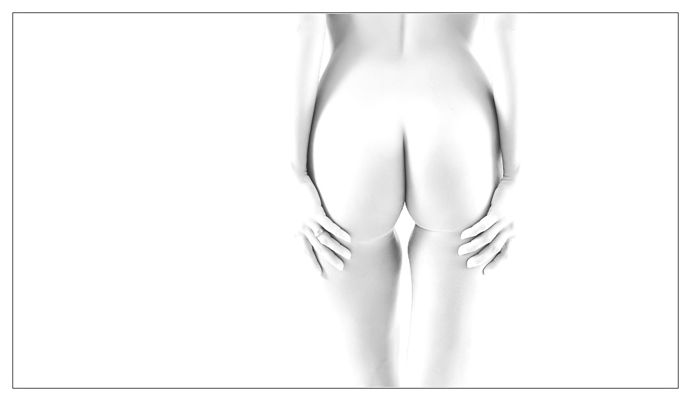 High-Key-AktfotoLëtzebuergesch: Highkey-Foto